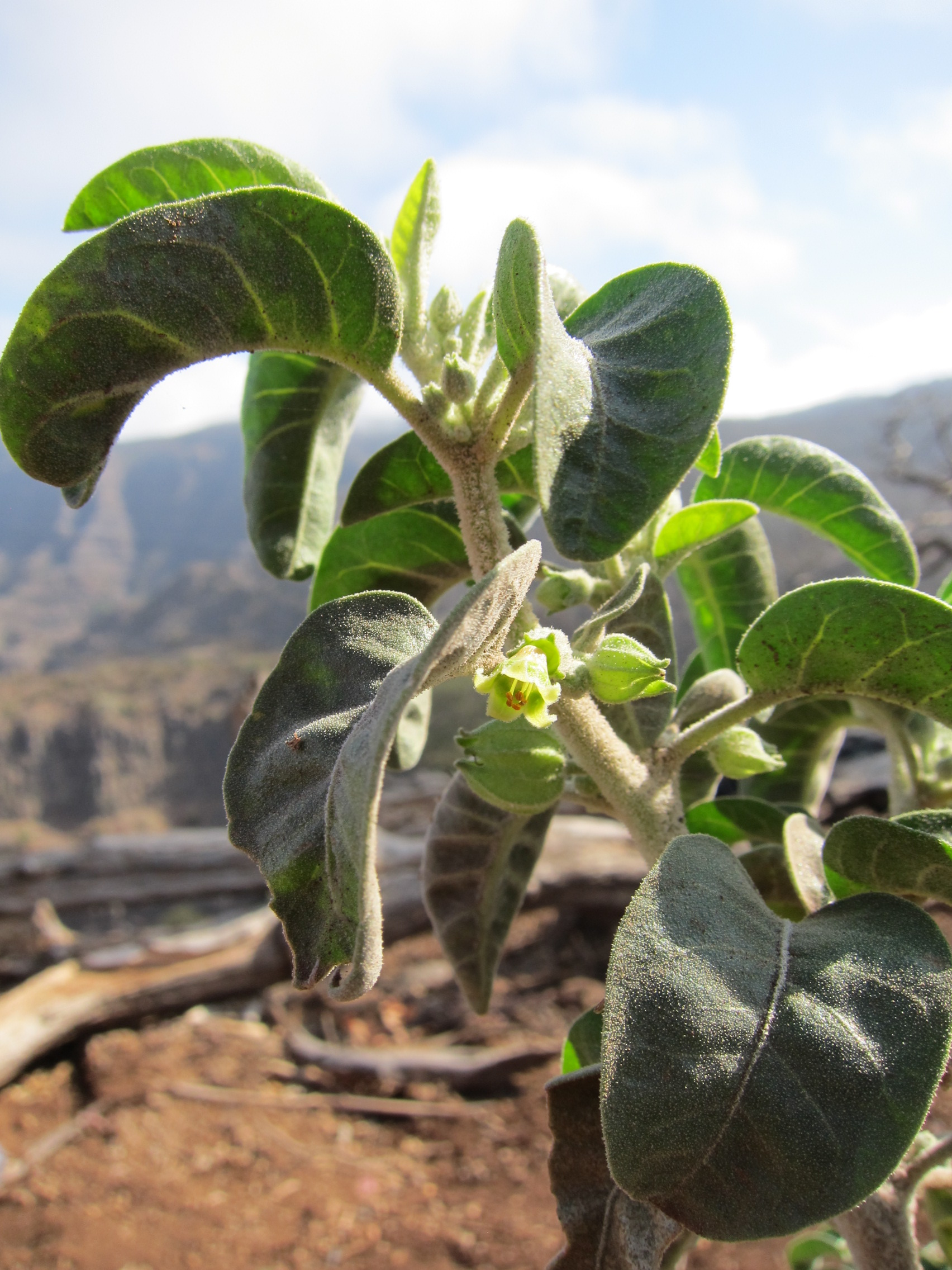 Withania grisea (Hepper & Boulos) Thulin, Forêt du Day, près de la maison du Gouverneur, Djibouti.